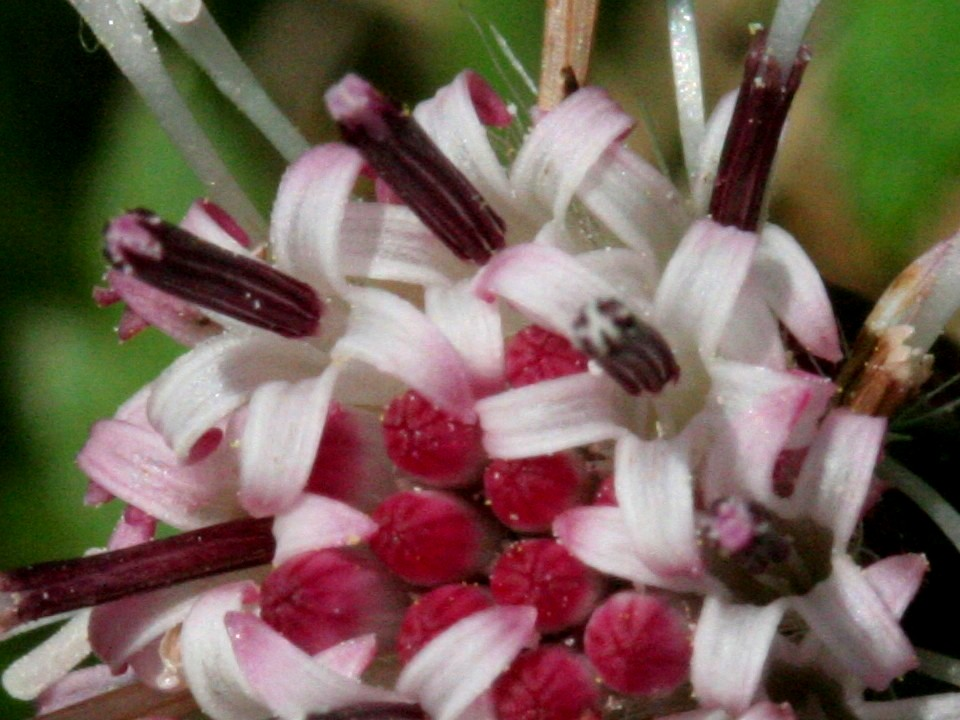 Tossilaggine alpina - Località : Cima Sappada, Sappada (BL), 1290 m s.l.m.